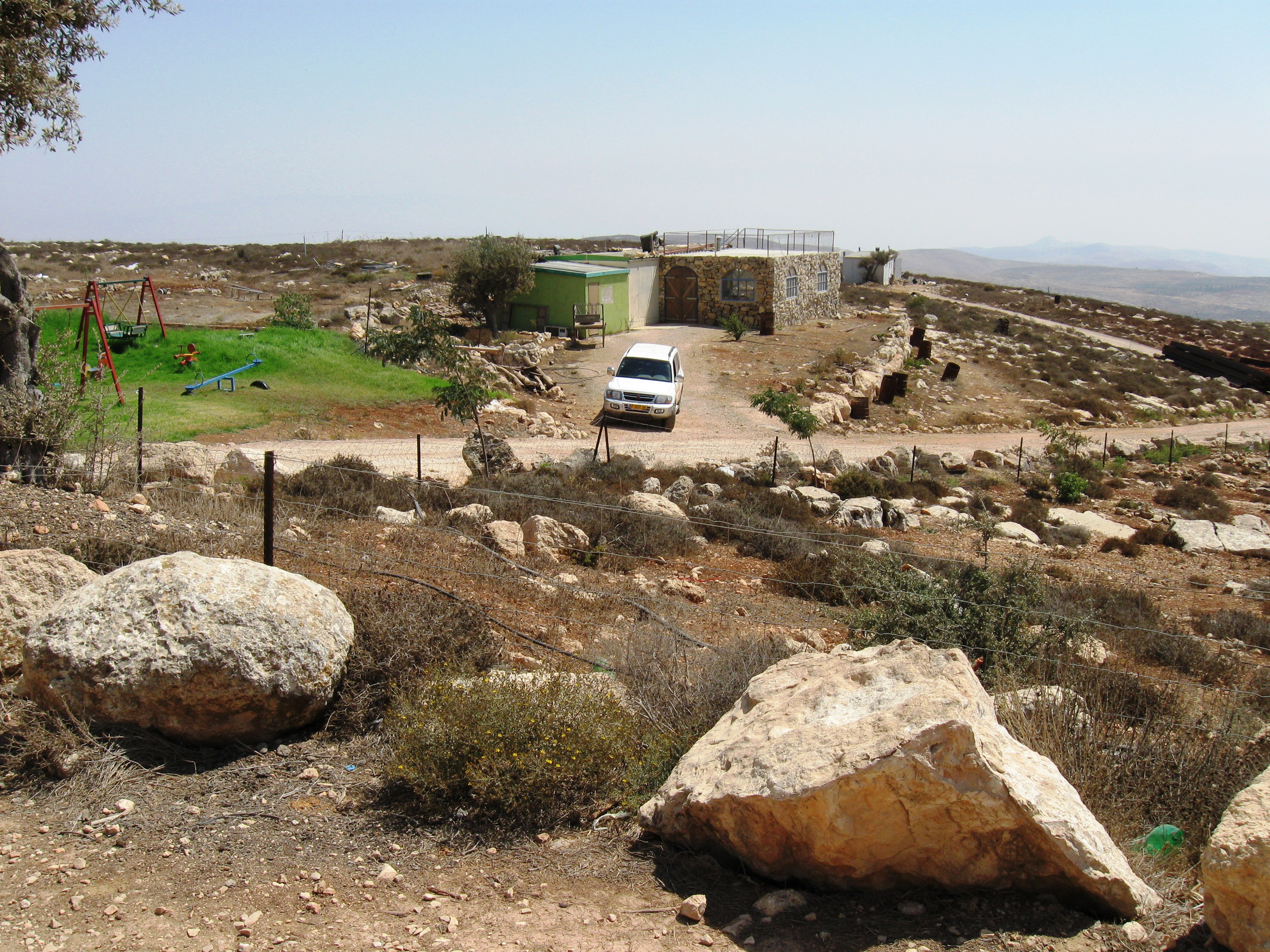 מבנה בחוות סקלי רישיון נוצר על ידי משתמש:Daniel Ventura